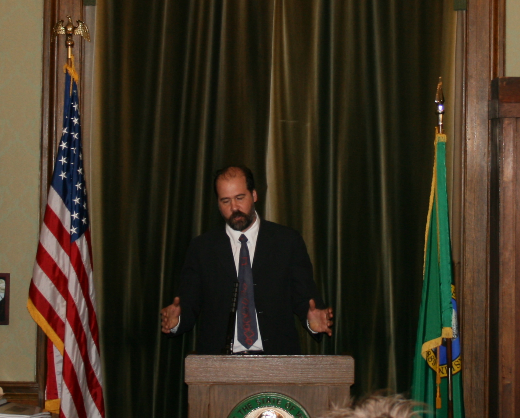 Krist Novoselic